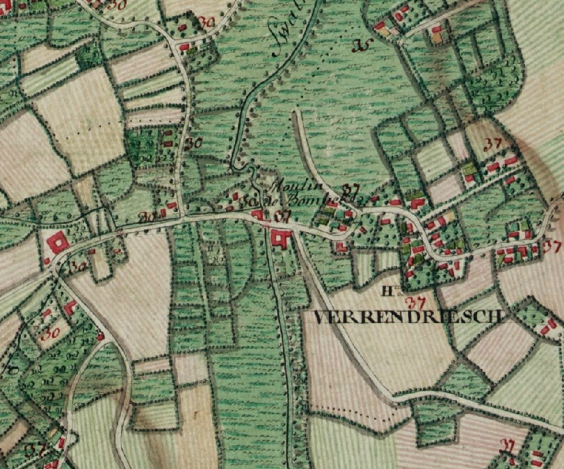 Boembekemolen - Boembeke - Michelbeke - Brakel - Oost-Vlaanderen - België